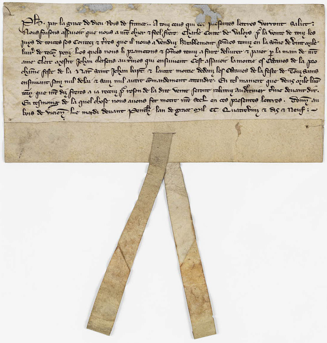 Reconnaissance de dette de Philippe le Bel à son frère Charles de Valois : 20 000 £t en échange des droits sur tous les Juifs des terres de Charles